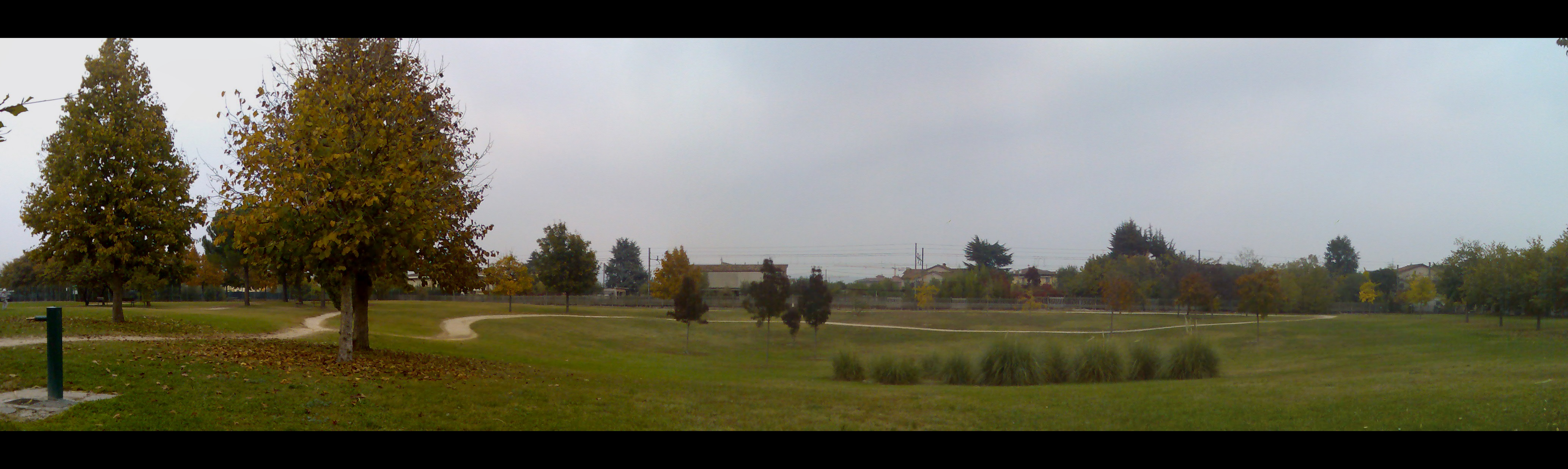 Parco dell'Amicizia, San Massimo all'Adige, Verona. Foto scattata il giorno 31 ottobre 2011.